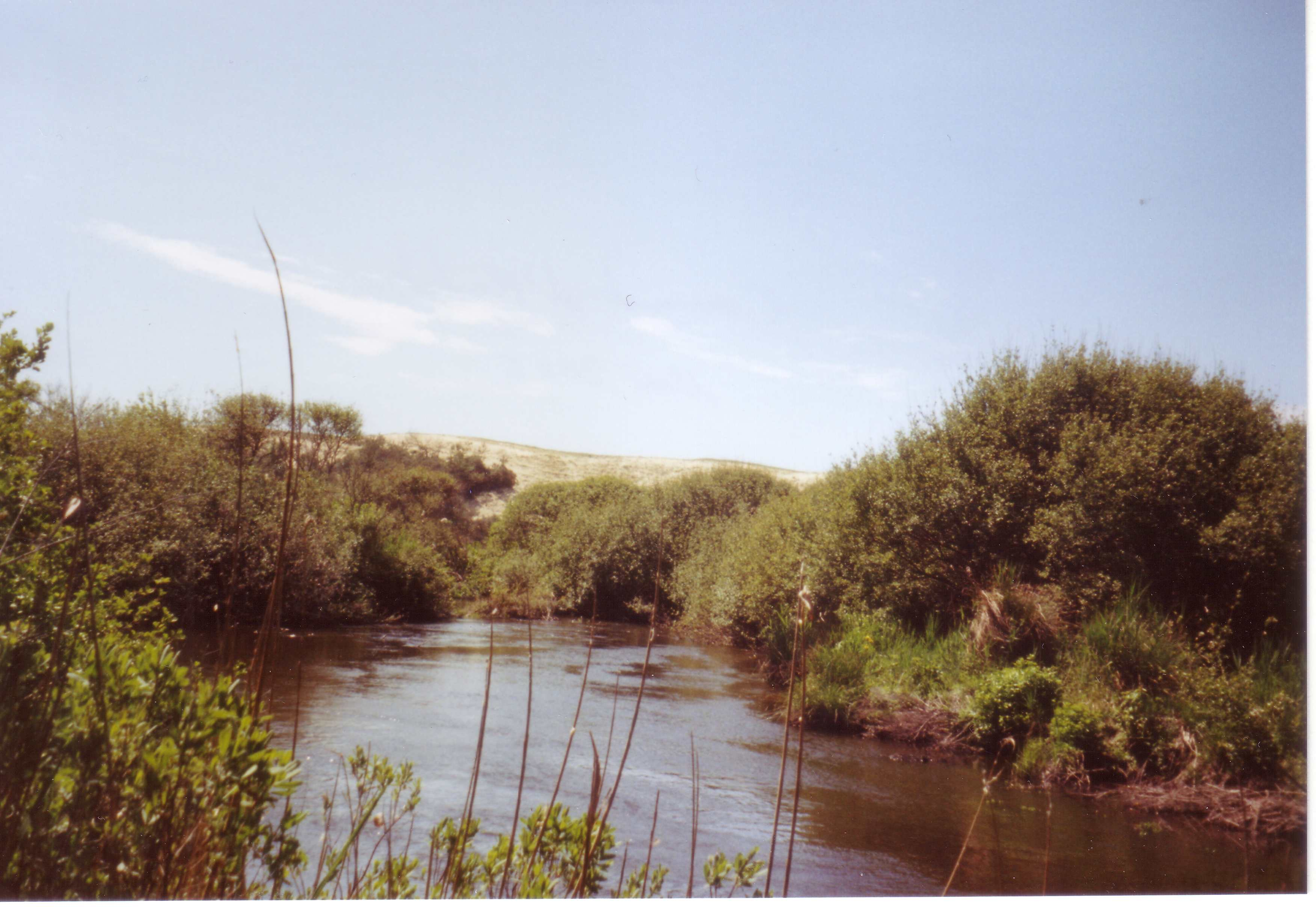 Le Courant d’Huchet dans les Landes